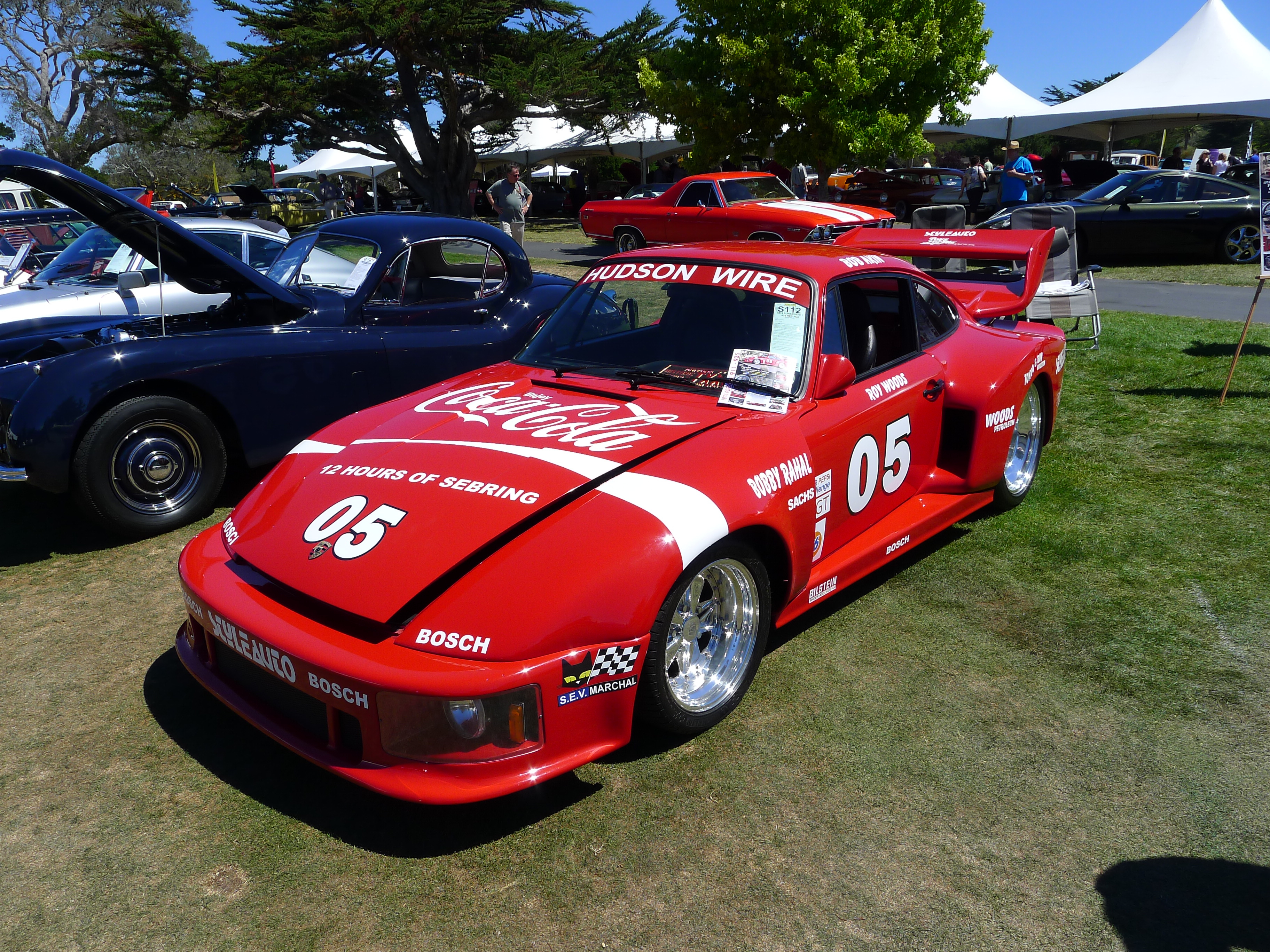 Porsche Racer